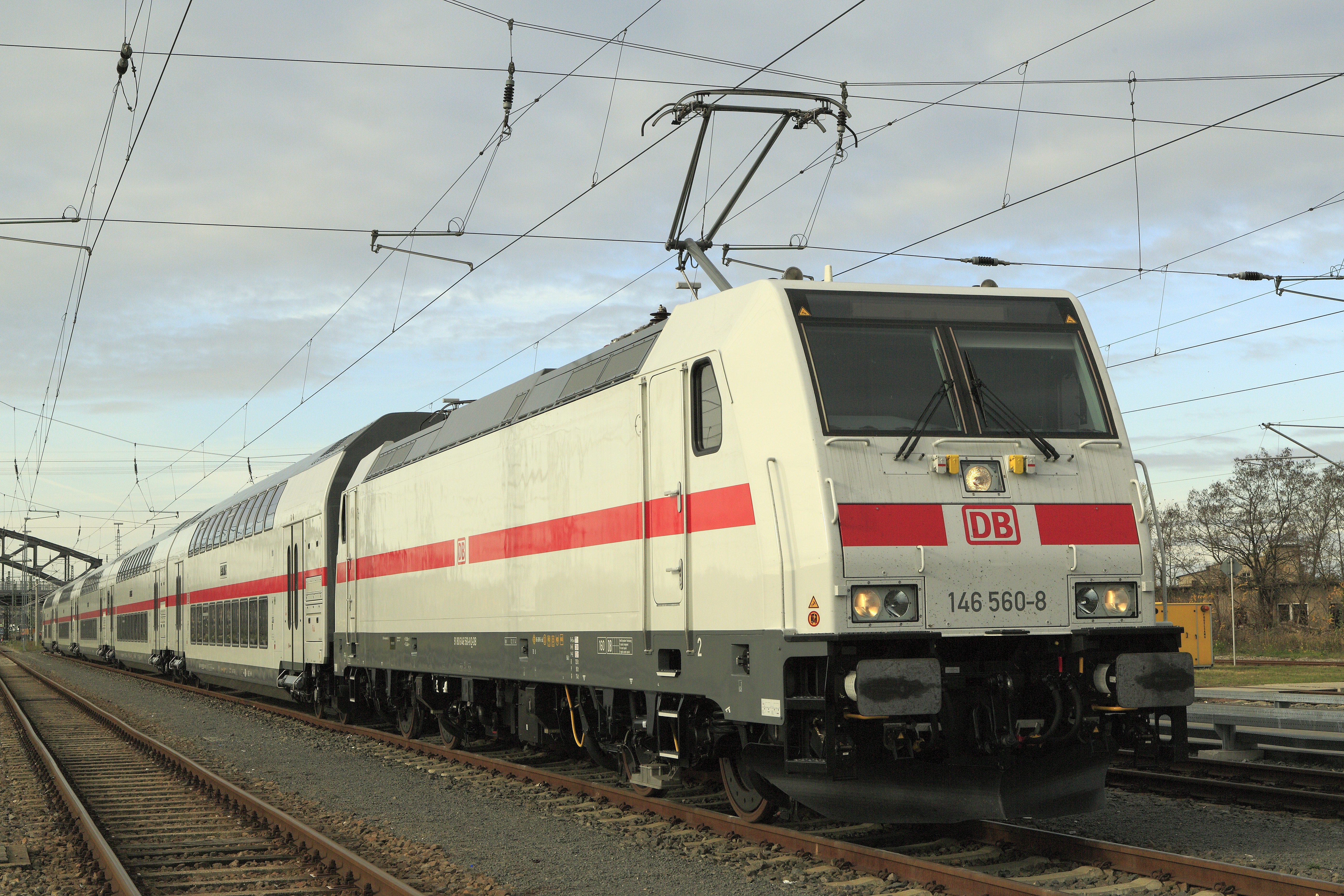 Personalschulung vor Einsatzbeginn, die Zugeinheit ist am Aufnahmetag zugelassen worden. Die Lokomotive ist aufgerüstet und versorgt den Wagenzug mit Spannung.